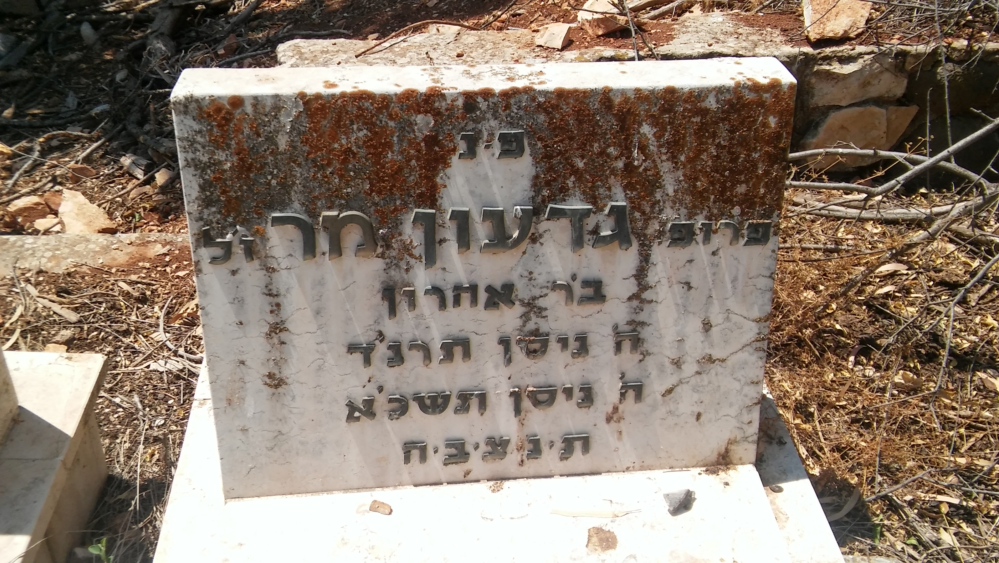 קברו של גדעון מר - ראש פינה